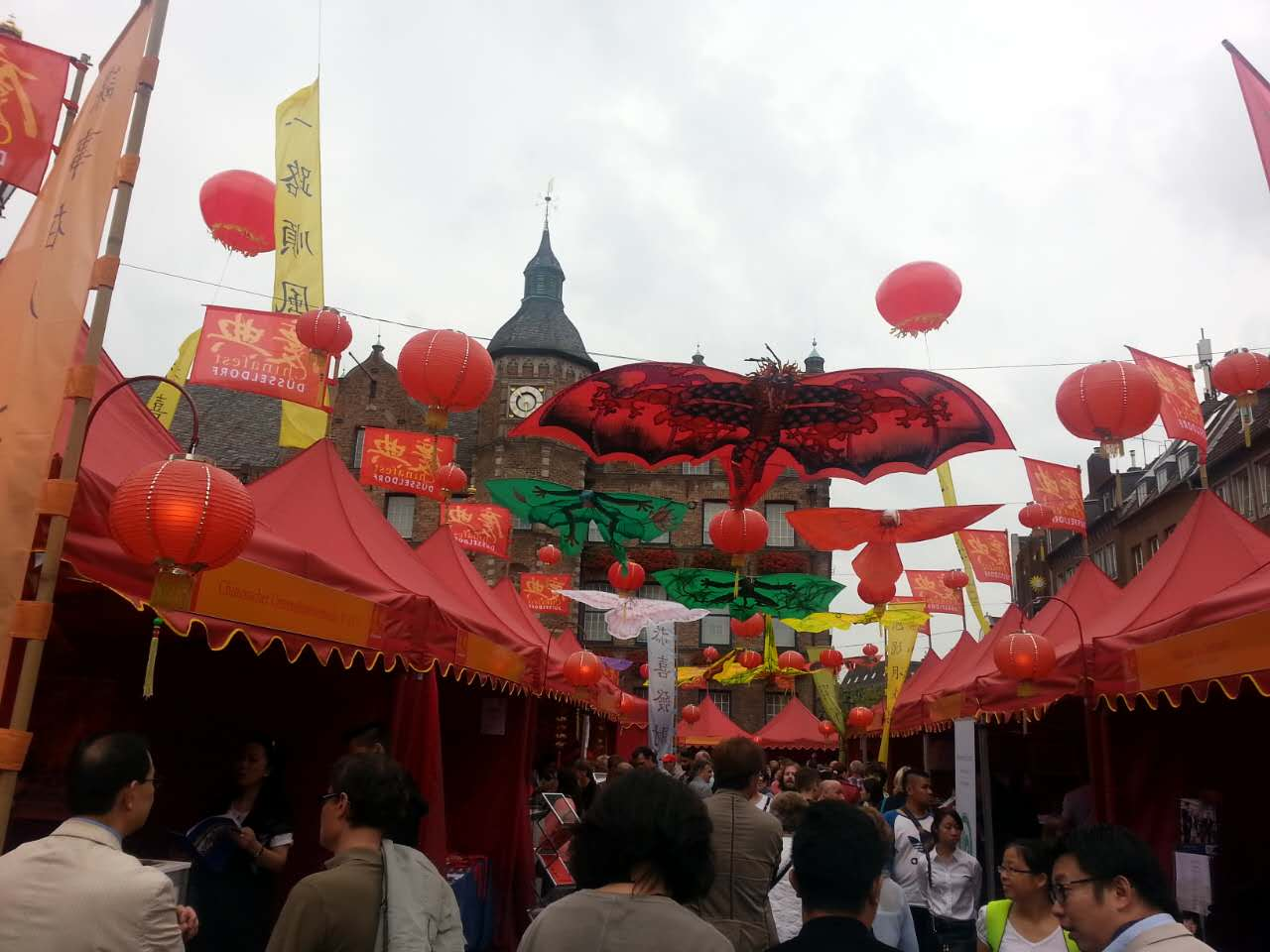 Chinafest Düsseldorf 2016 Buden